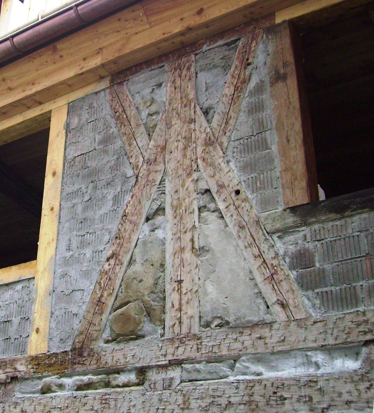 typische Fachwerkfigur des "wilden Mannes" (Lauf/Pegnitz)